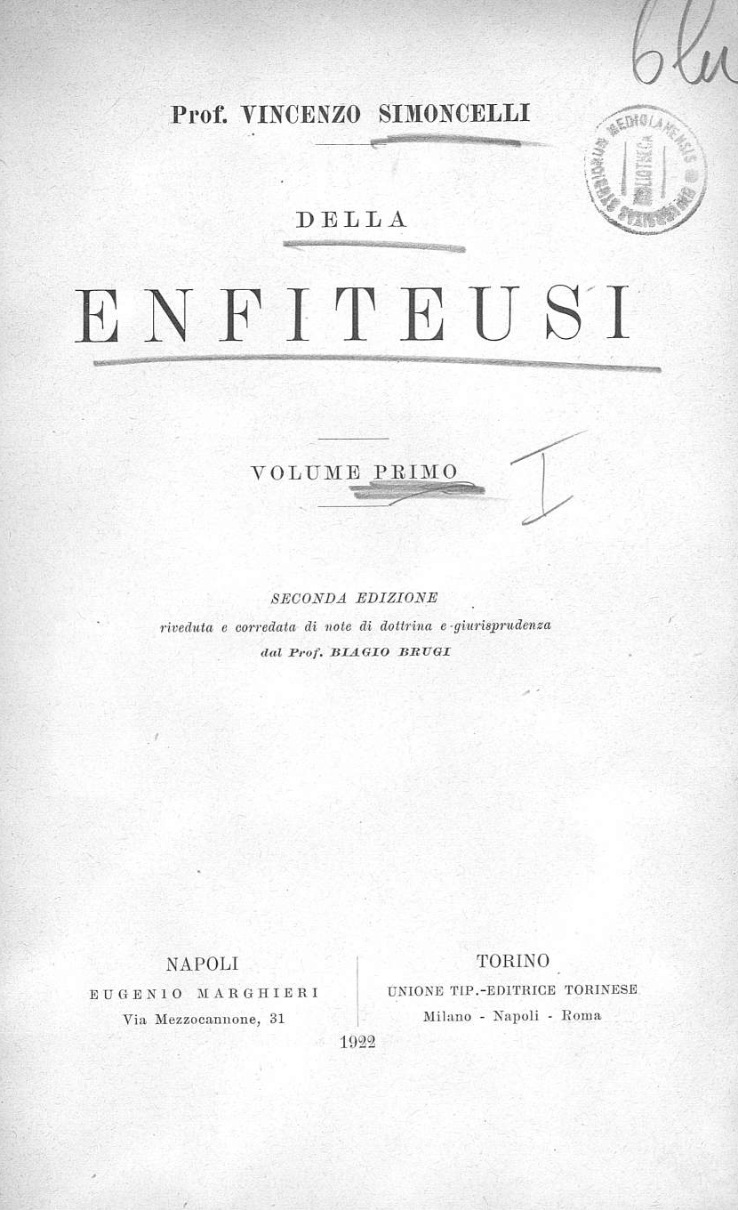 Frontespizio